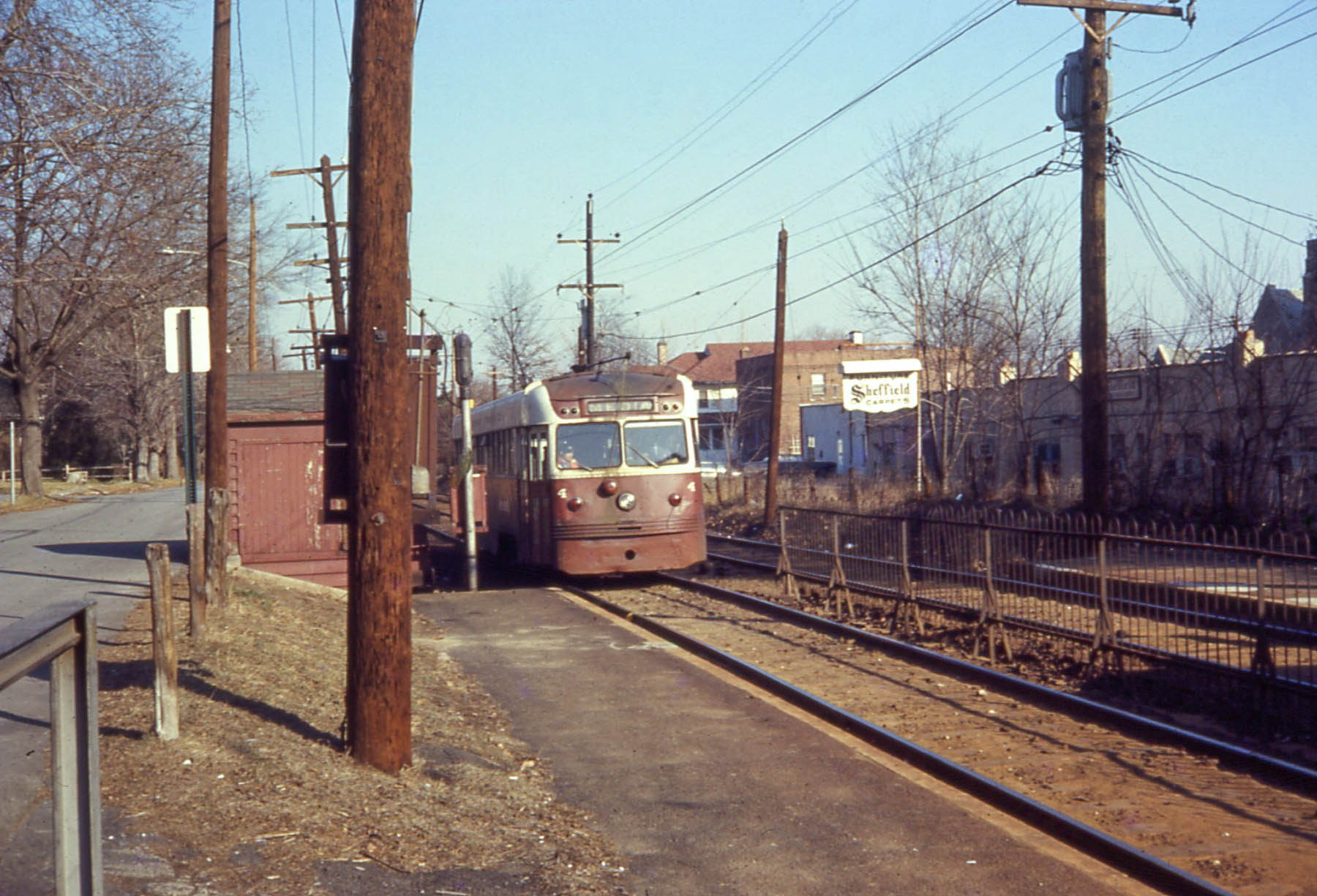 19690104 28 PST 4 Drexel Hill